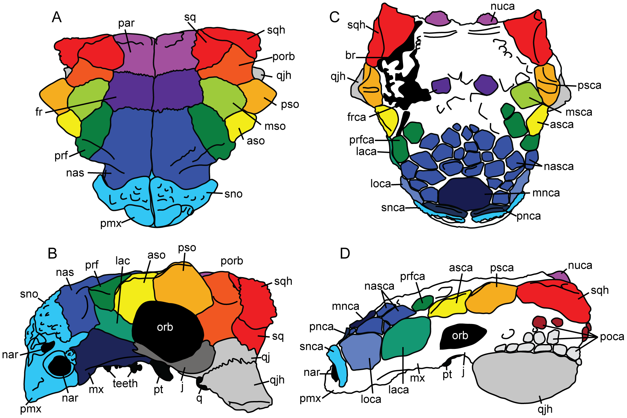 Cranial anatomy of ankylosaurids, including terminology for ornamentation patterns. ZPAL MgD II/1, juvenile Pinacosaurus grangeri in A) dorsal and B) left lateral views, showing boundaries of cranial bones. Boundaries between cranial bones are not visible in most adult ankylosaurids. C) UALVP 31, Euoplocephalus tutus, in dorsal view. D) CMN 8530, Anodontosaurus lambei (holotype), in left lateral view. Cranial ornamentation that is subdivided into discrete polygons (rather than generalized rugosity) are referred to as caputegulae. Abbreviations: asca, anterior supraorbital caputegulum; aso, anterior supraorbital; br, break or plaster; fr, frontal; frca, frontal caputegulum; j, jugal; lac, lacrimal; laca, lacrimal caputegulum; loca, loreal caputegulum; mnca, median nasal caputegulum; msca, middle supraorbital caputegulum; mso, middle supraorbital; mx, maxilla; nar, naris; nas, nasal; nasca, nasal caputegulum; nuca, nuchal caputegulum; orb, orbit; par, parietal; pmx, premaxilla; pnca, postnarial caputegulum; poca, postocular caputegulum; porb, postorbital; prf, prefrontal; prfca, prefrontal caputegulum; psca, posterior supraorbital caputegulum; pso, posterior supraorbital; pt, pterygoid; q, quadrate; qj, quadratojugal; qjh, quadratojugal horn; snca, supranarial caputegulum; sno, supranarial ornamentation; sq, squamosal; sqh, squamosal horn.